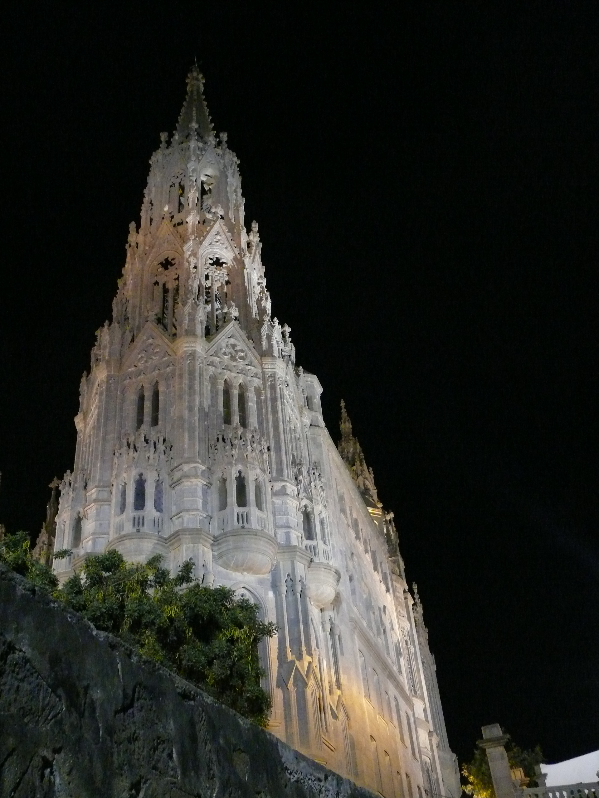 Casco Histórico, Arucas, Gran Canaria